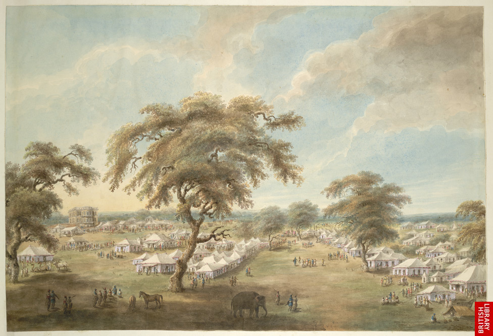 Lord Moira's camp at Moradabad